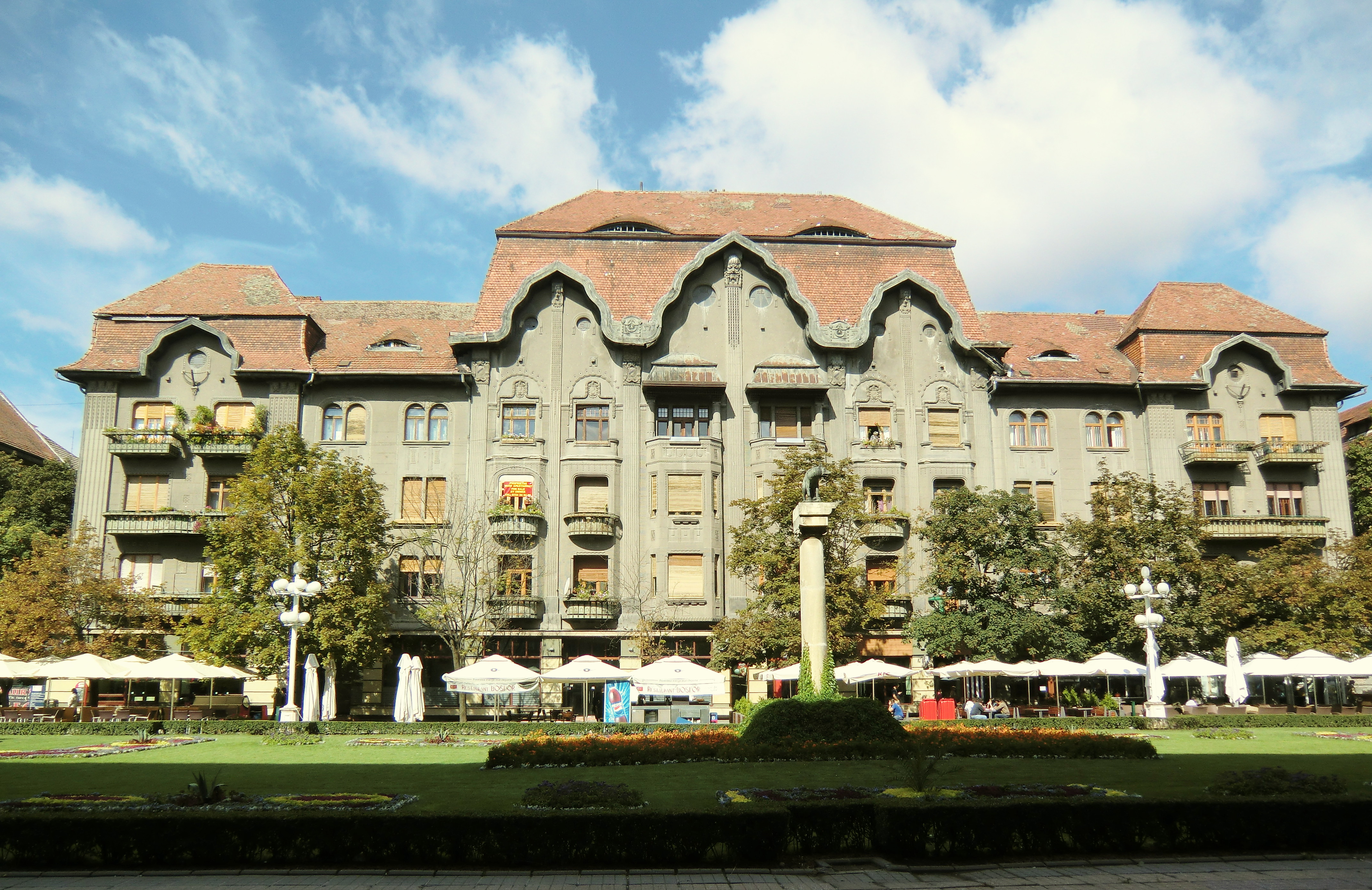 Dauerbach-Palais, Temeswar